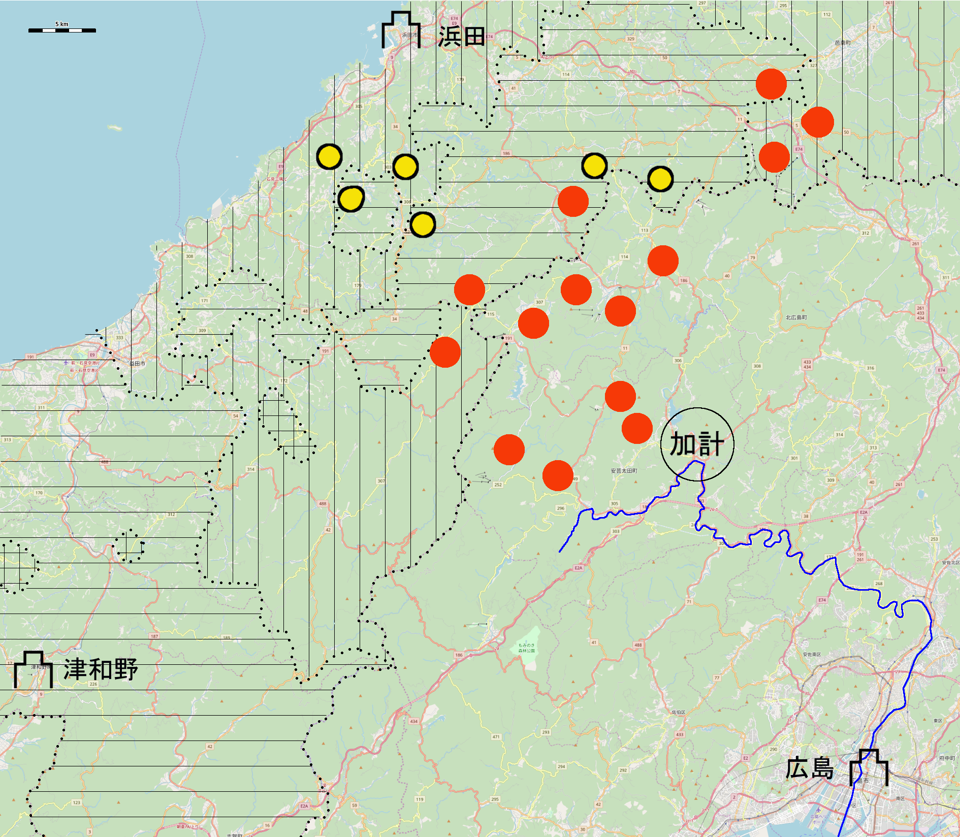 広島県安芸太田町を拠点とした加計隅屋のたたら分布。赤がたたら、黄が鉄穴。 This map may be incomplete, and may contain errors. Don't rely solely on it for navigation.